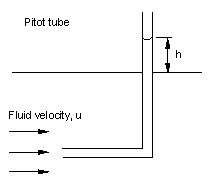 Hydraulic Pitot tube